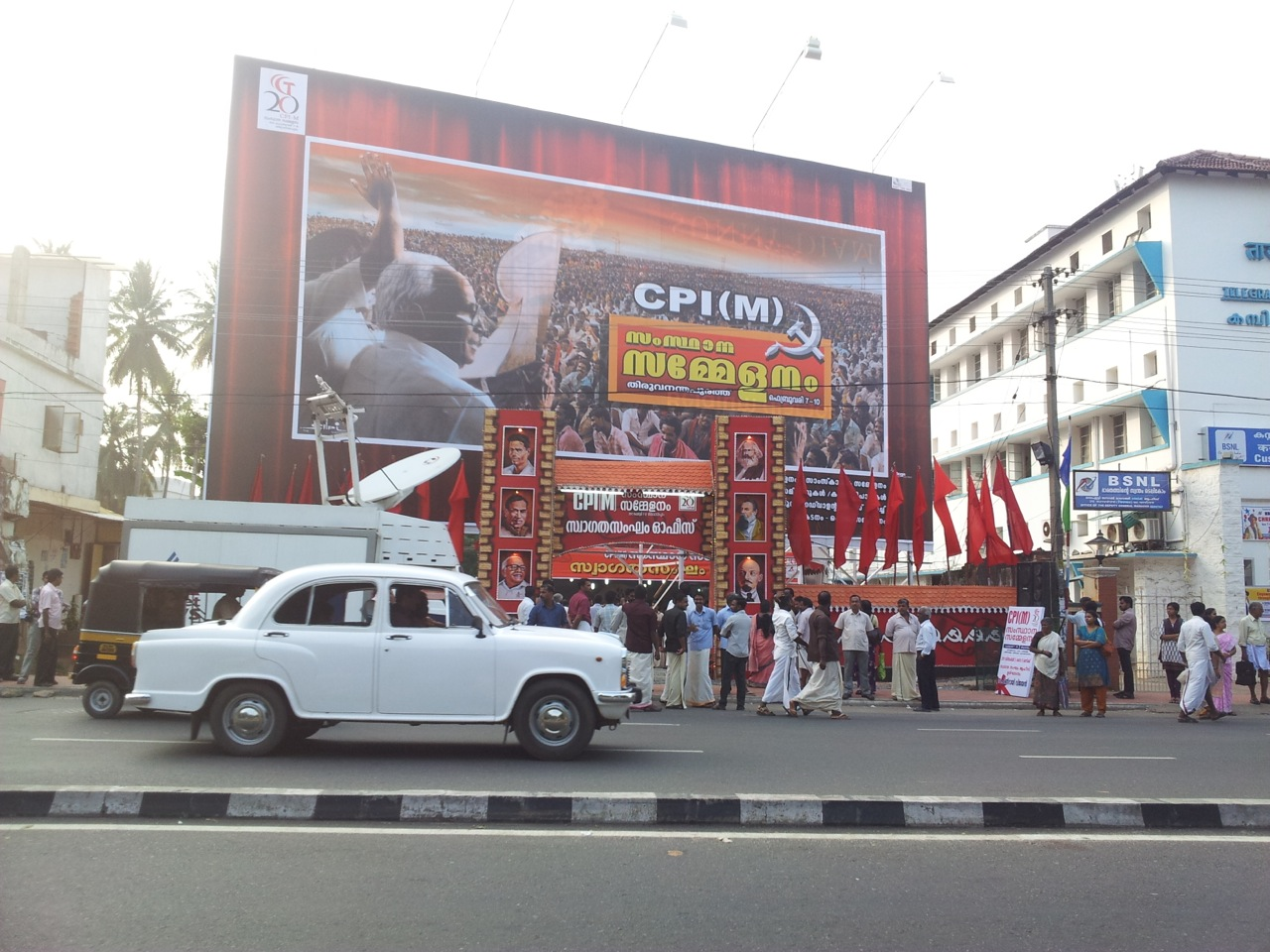 Trivandrum